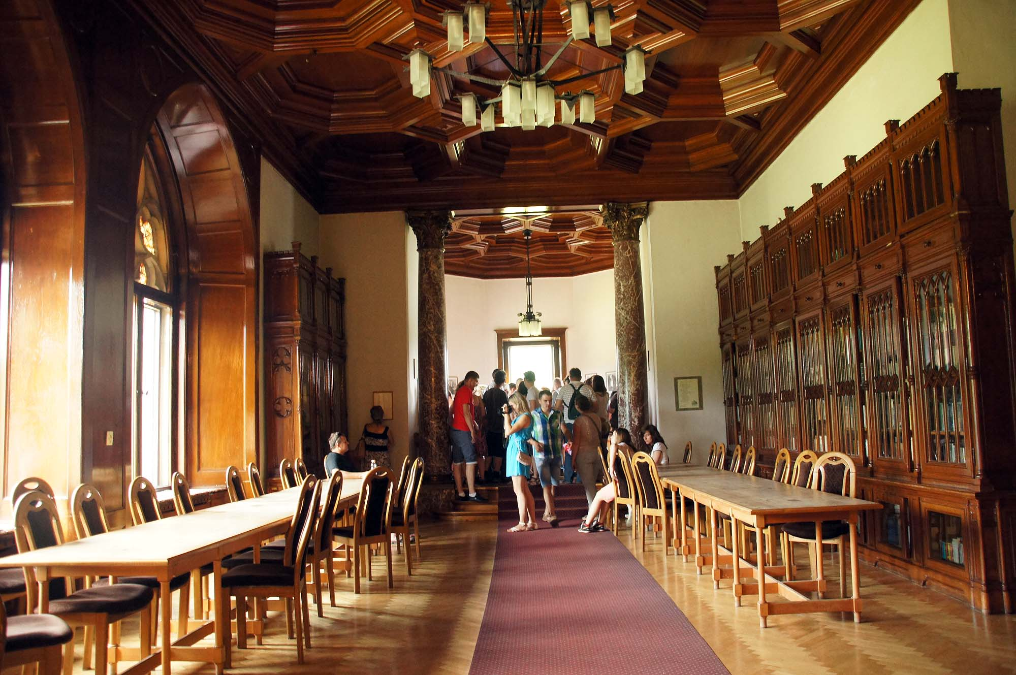 Moszna, zespół pałacowy, XVIII, XX